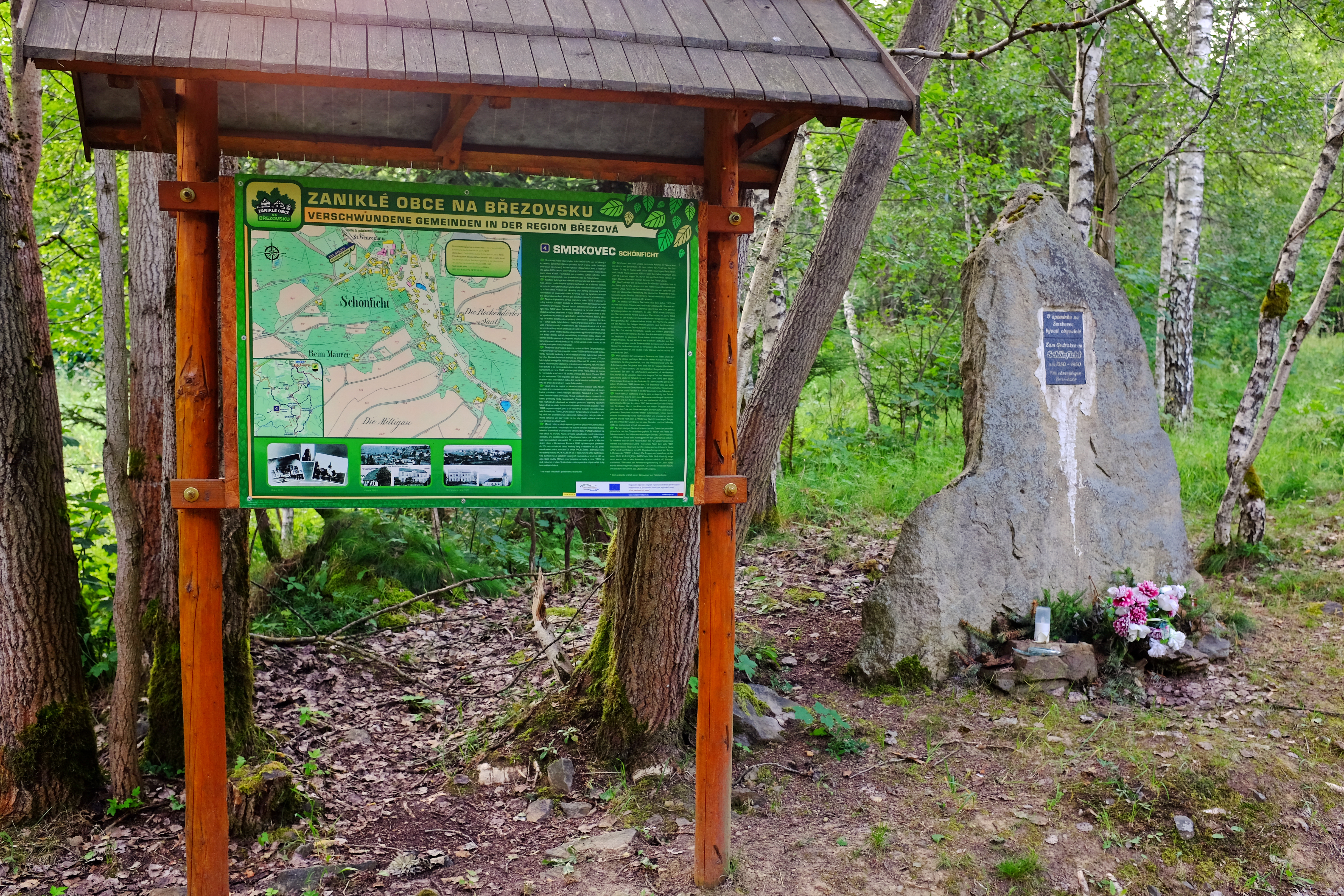 Smrkovec, zaniklá obec ve Slavkovském lese, pomník a infopanel zaniklé obce, okres Sokolov